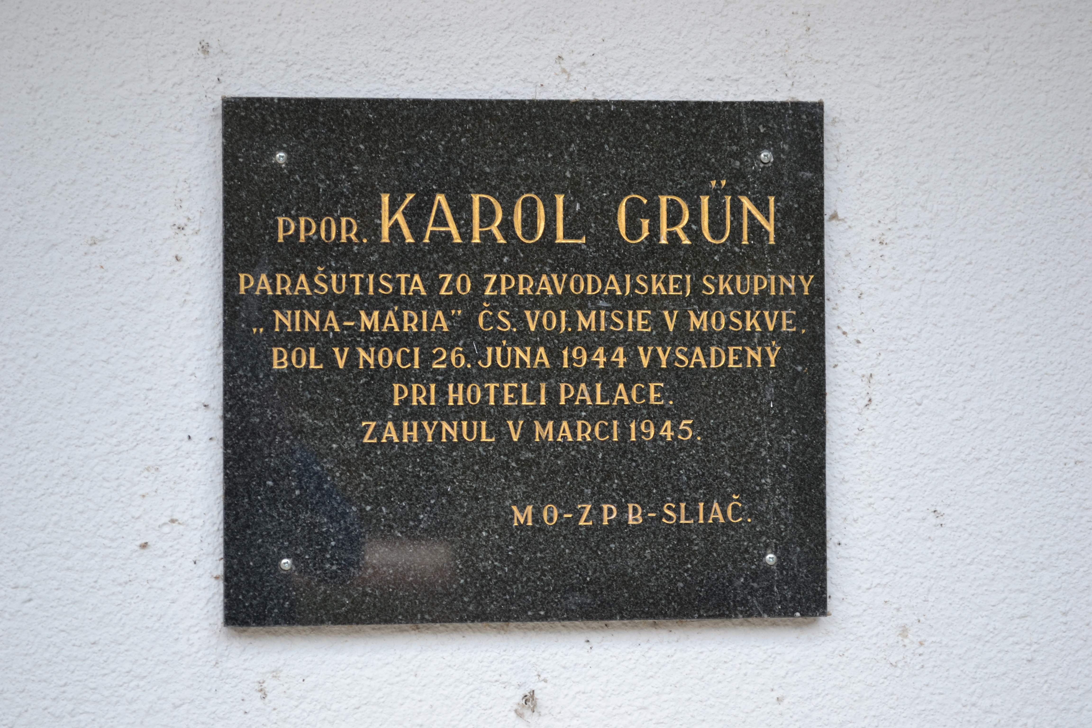 Pamätná tabuľa Karola Grüna v kúpeľoch Sliač.